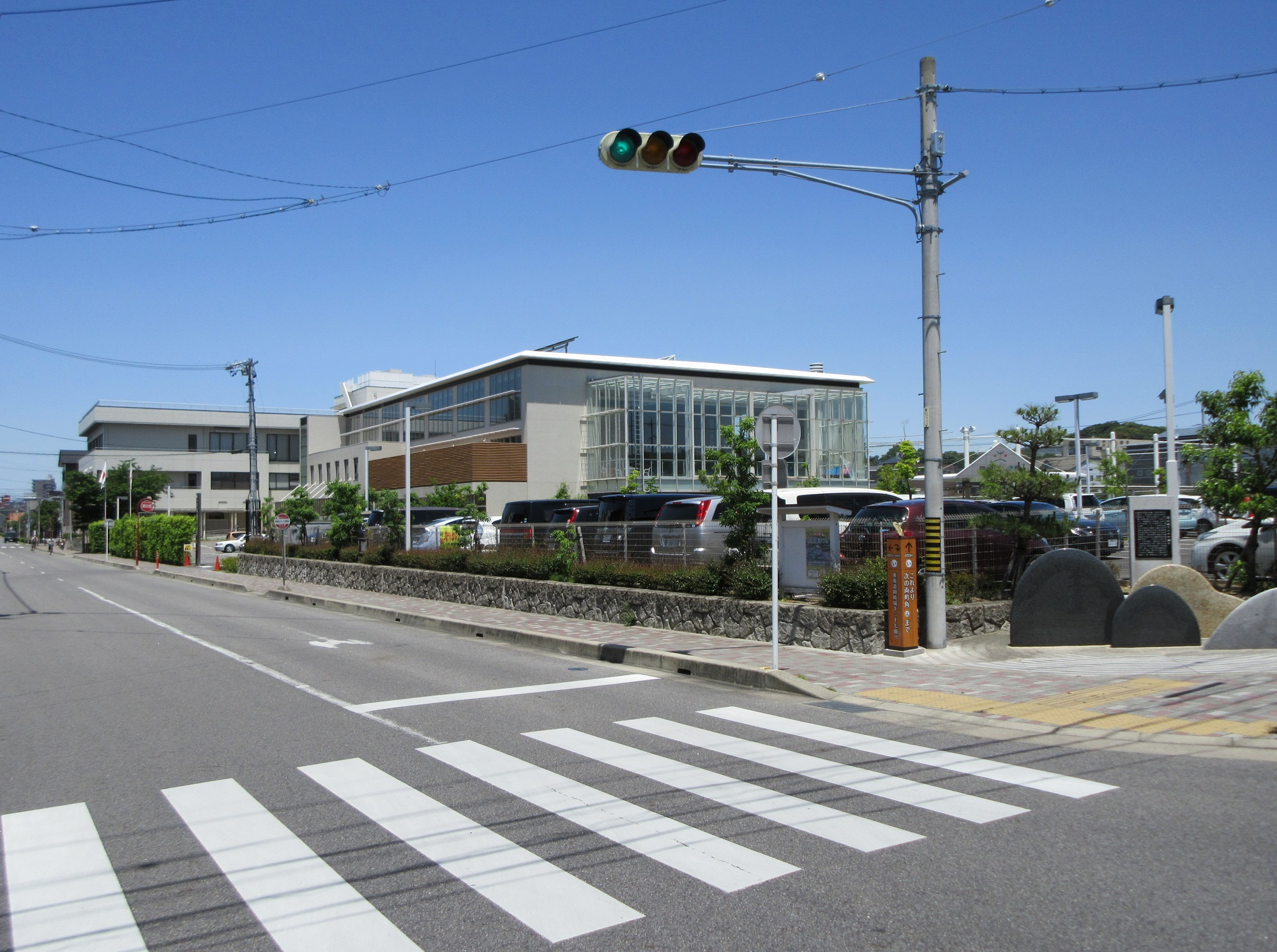 若宮町2丁目交差点、岡崎げんき館